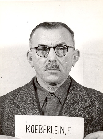 Friedrich Köberlein (* 18. Oktober 1885), deutscher SS-Standartenführer (1944) im Wirtschafts- und Verwaltungshauptamt. Amtsleiter der Abteilung B III (Unterkunftsverwaltung)